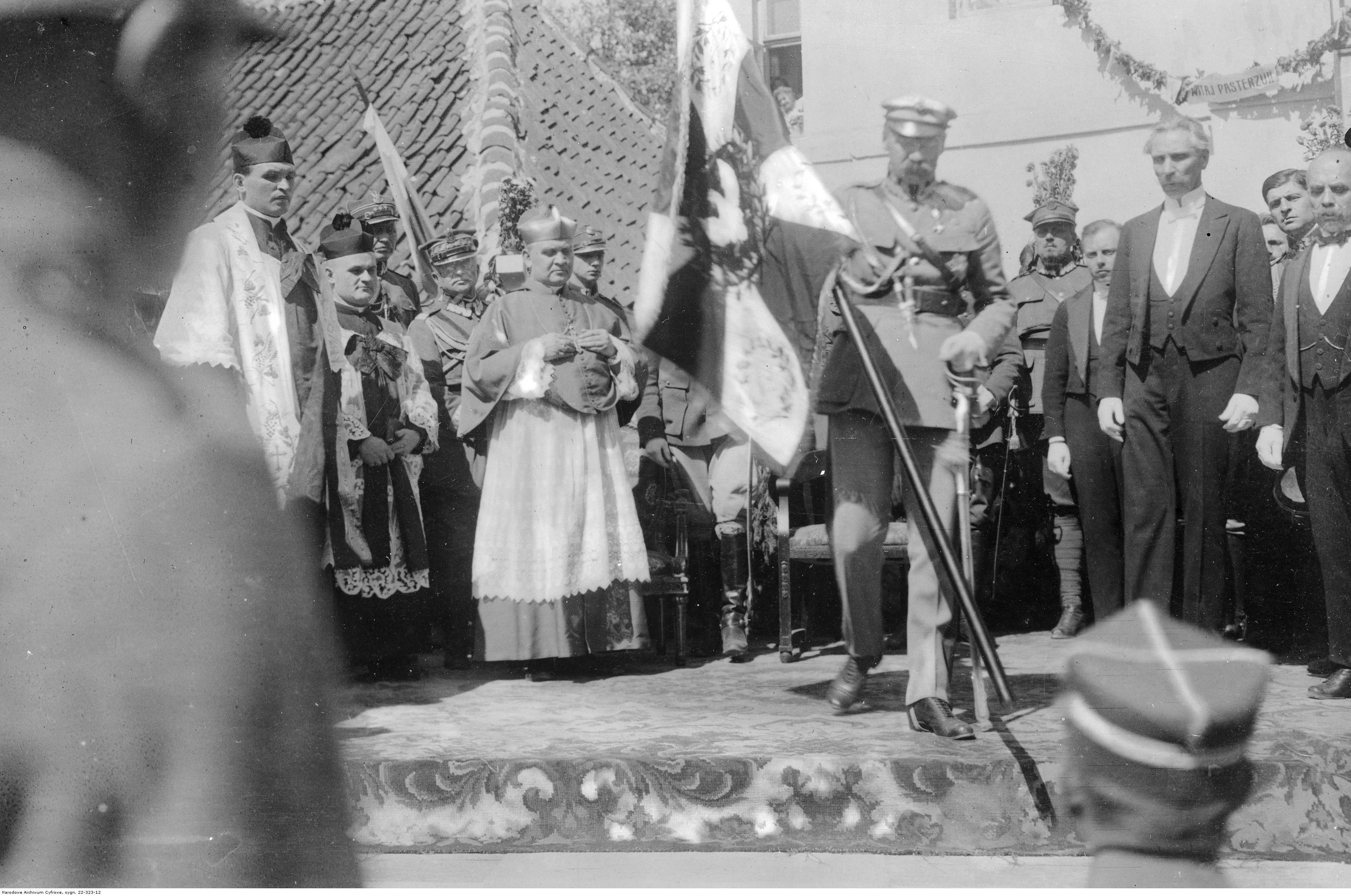 Marszałek Józef Piłsudski wręcza sztandar 42. Pułku Piechoty. Widoczni m.in. bp Jerzy Matulewicz (na lewo od Marszałka), prezes Rady Miejskiej w Białymstoku Feliks Filipowicz (na prawo od Marszałka).